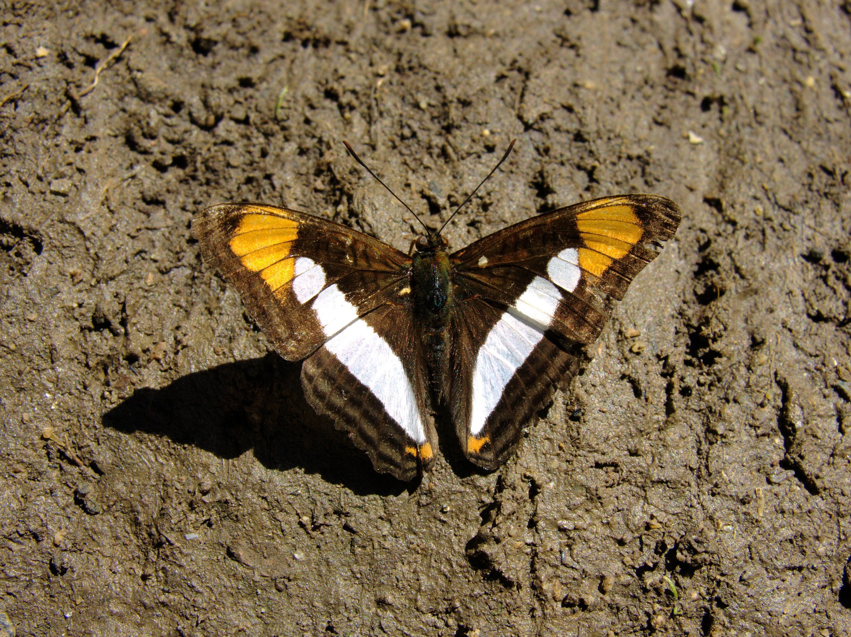 Adelpha syma (Nymphalidae, Limenitidinae), Curitiba, Brasil.